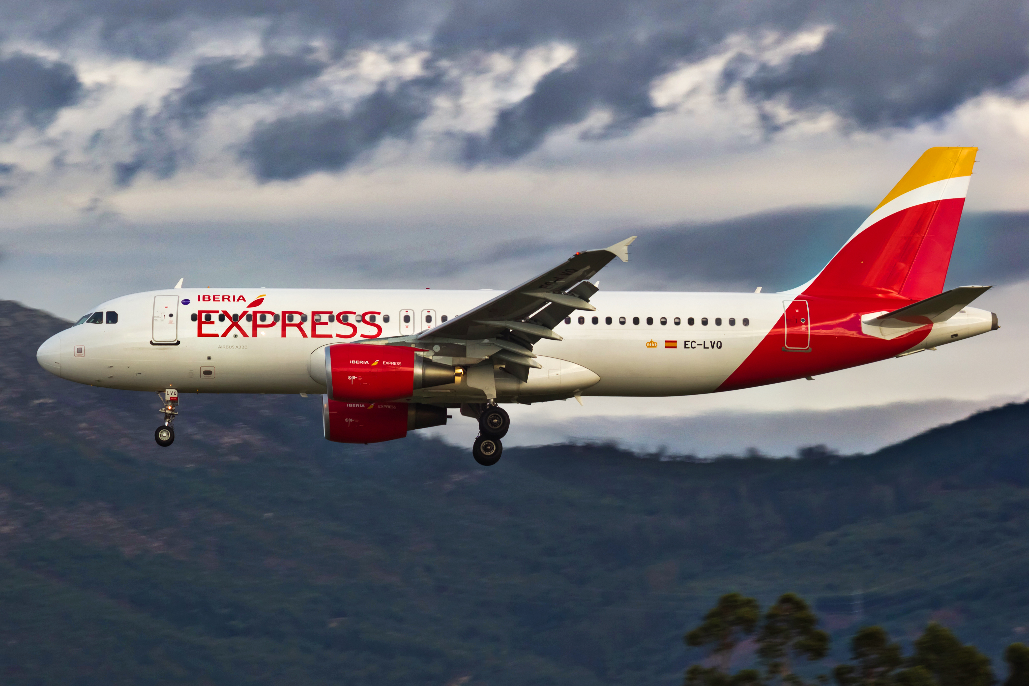 Airbus A320 de Iberia Express aterrando no aeroporto de Vigo.